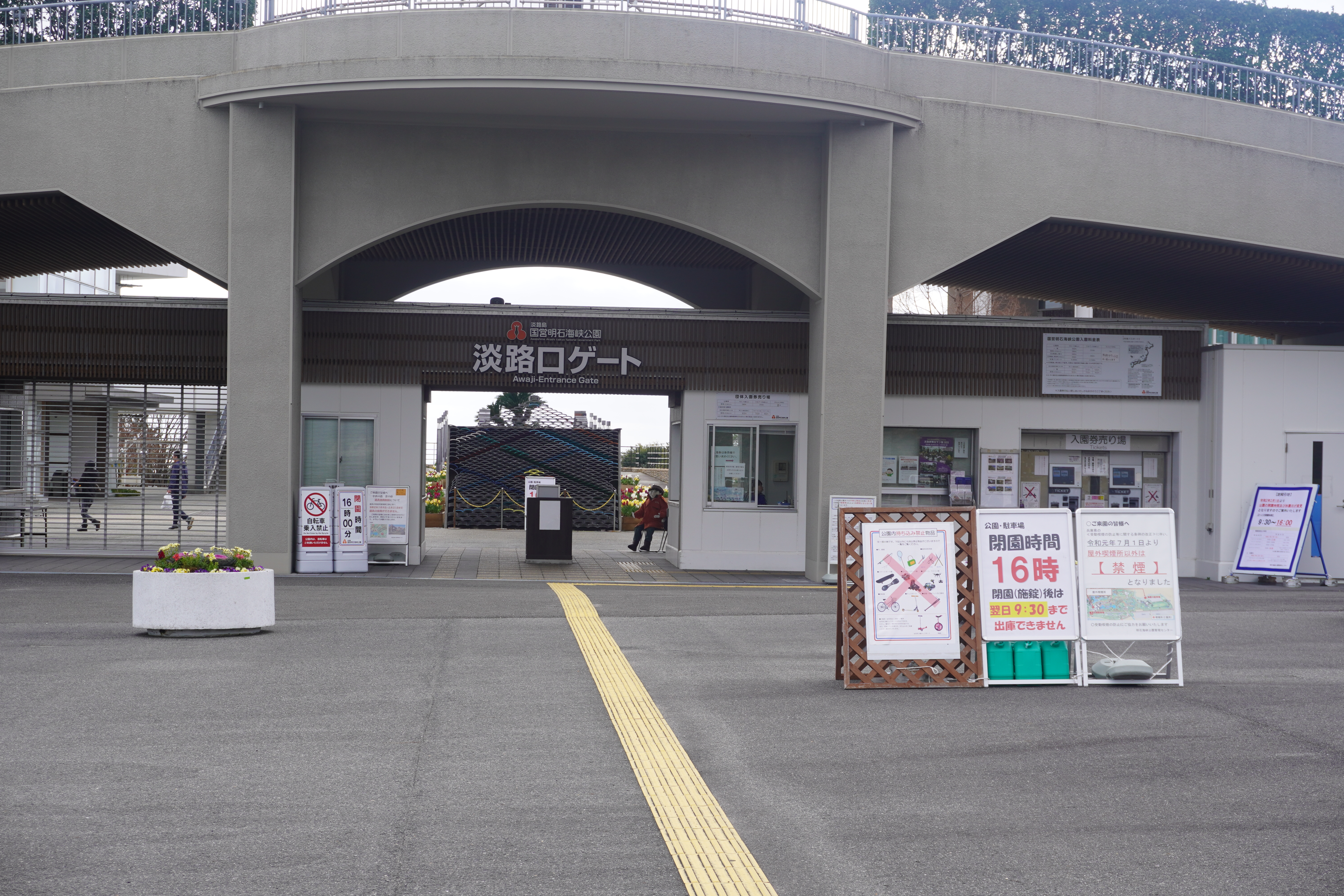 国営明石海峡公園淡路口ゲート